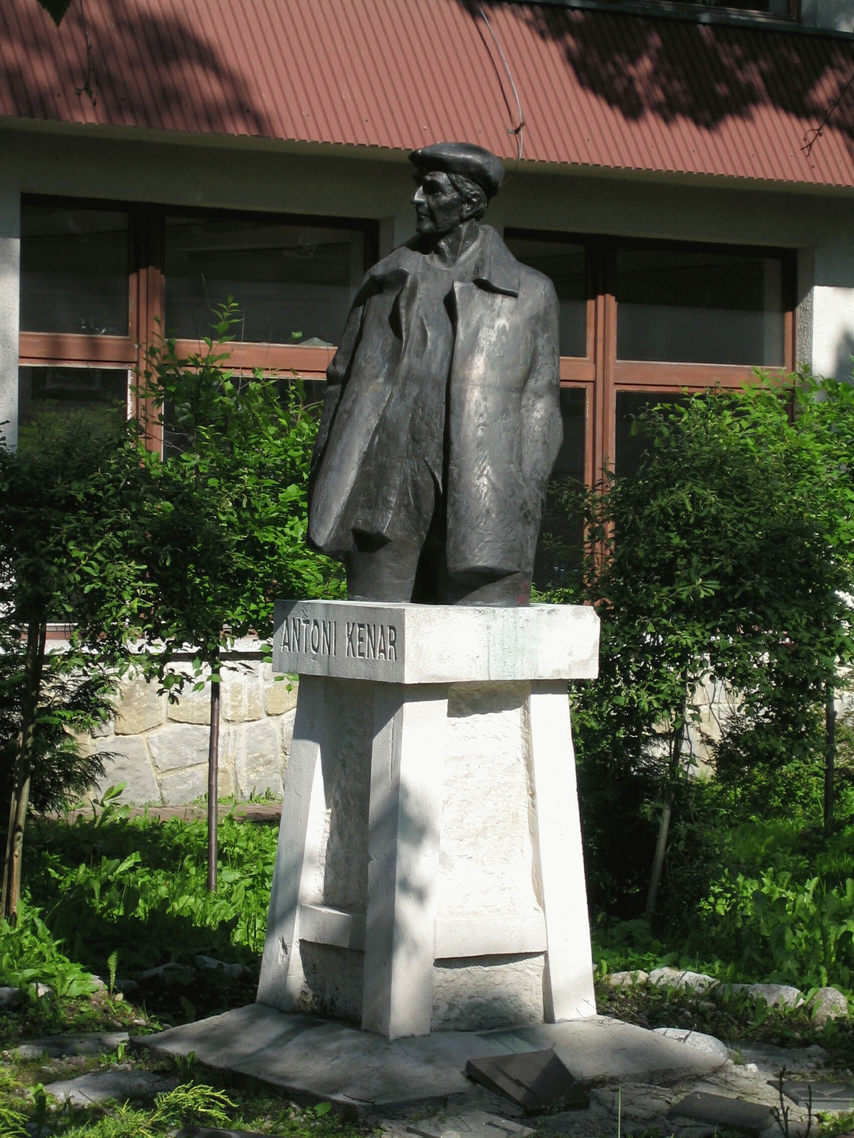 Monument A. Kenar